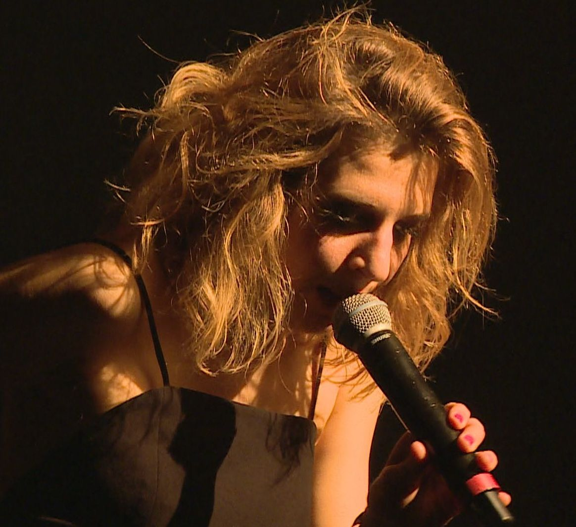 Amandine à Beaulieu le 04-11-2017 (1)